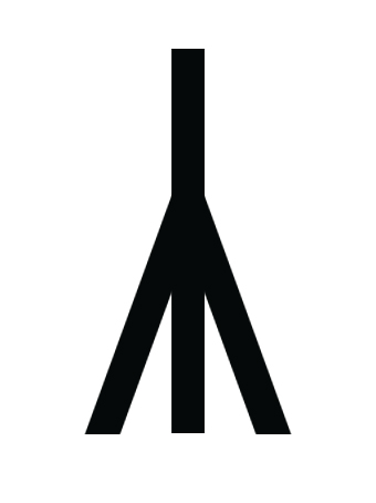 Fogde och Birkarlssläkten Kråkas bomärke.